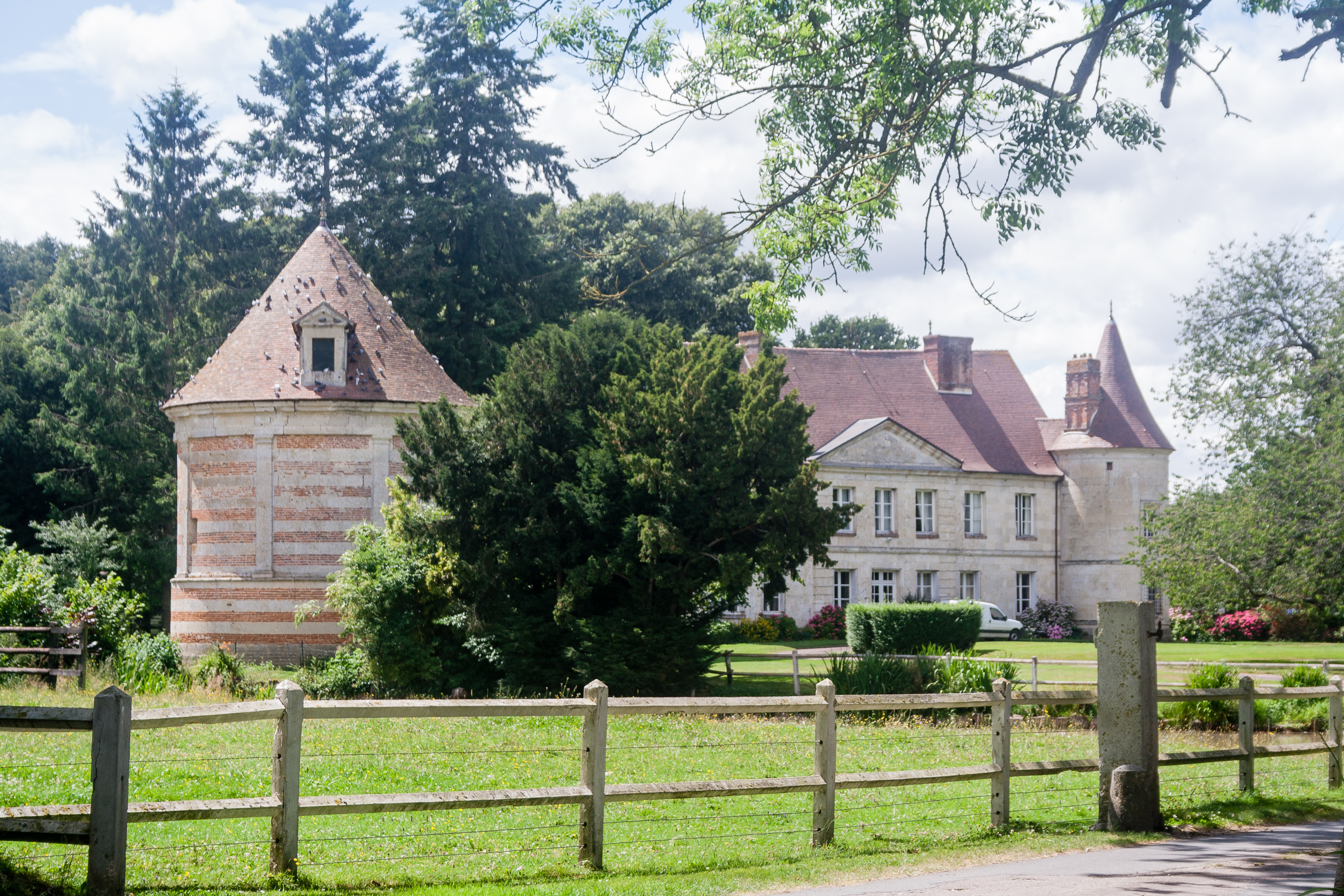 Château de Préaux-Saint-Sébastien (France).